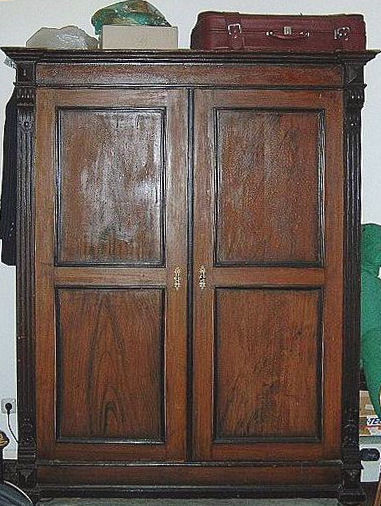 Kleiderschrank um die Jahrhundertwende ca.1900, nur aus Holz, ohne Schrauben oder Nägel